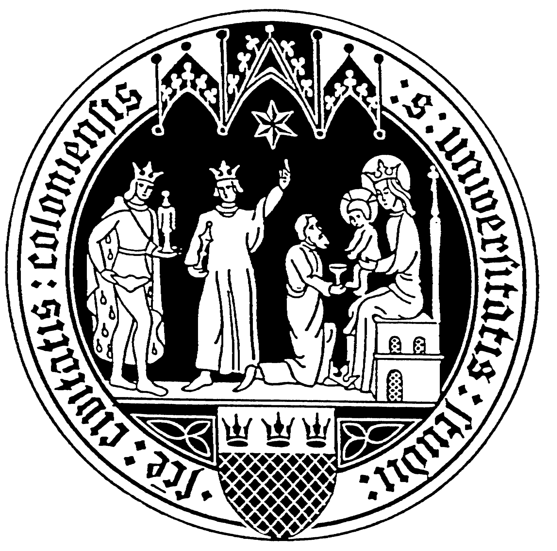 Das Siegel der Universität zu Köln